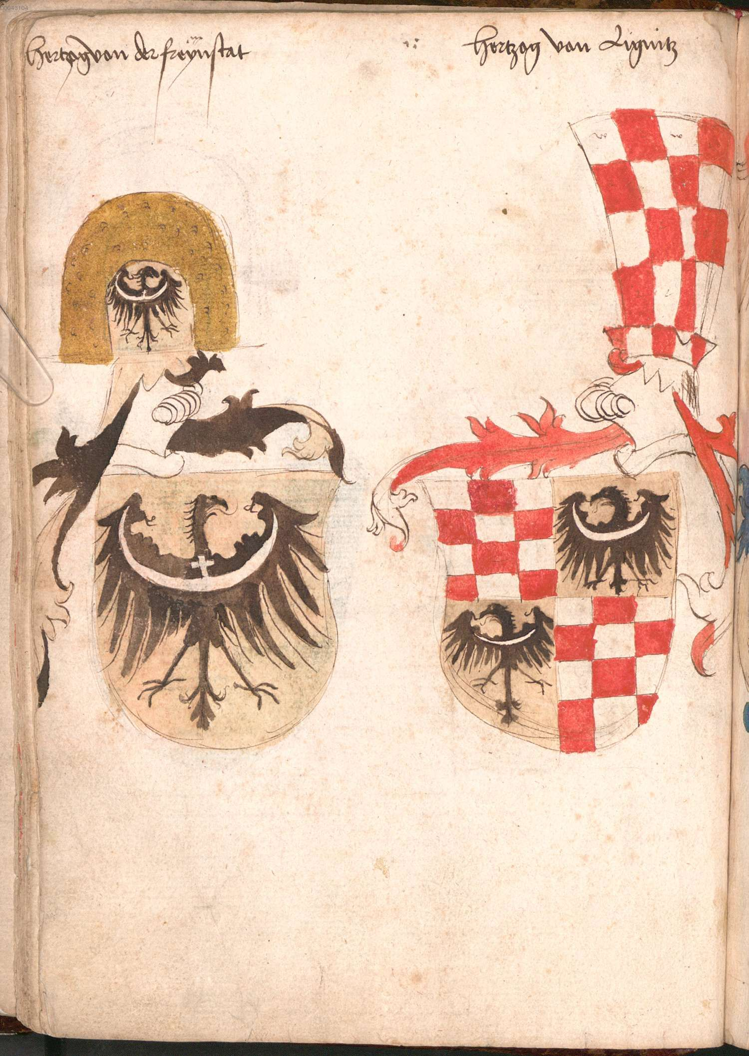 Familien- und Landeswappen des hohen Adels im Heiligen Römischen Reich: Wappen des Herzog von Freistadt und Herzog von Liegnitz, 30v